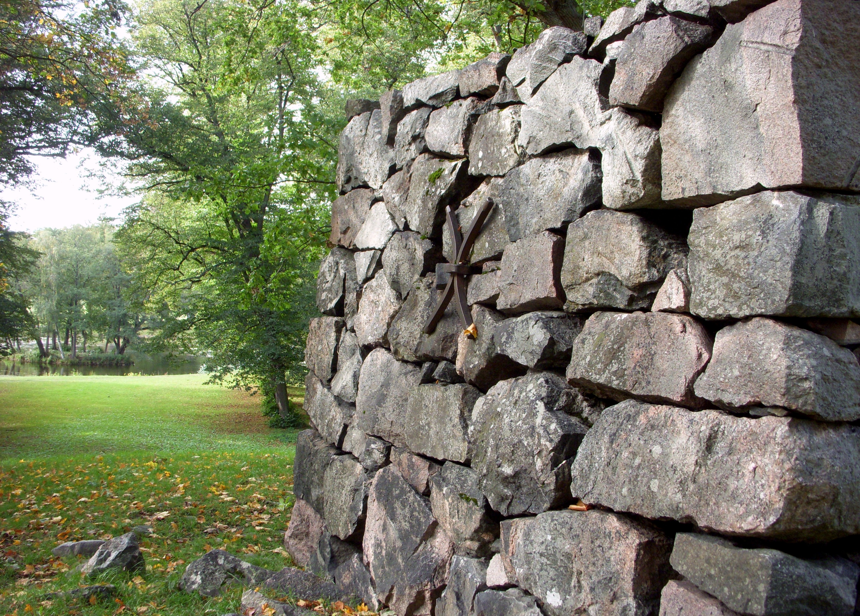 Monumentholmen i Drottningholms slottspark, postamentet för monumentet över Gustav III